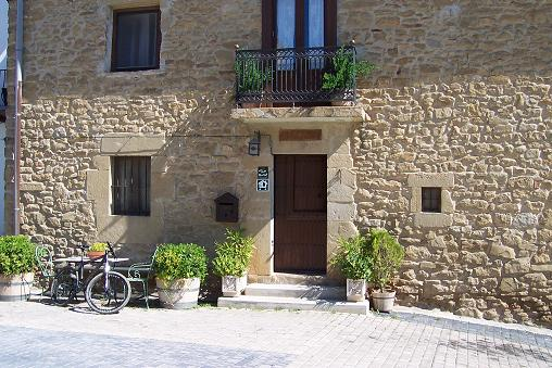 Fachada de casa Goñi casa de turismo rural en Navarra